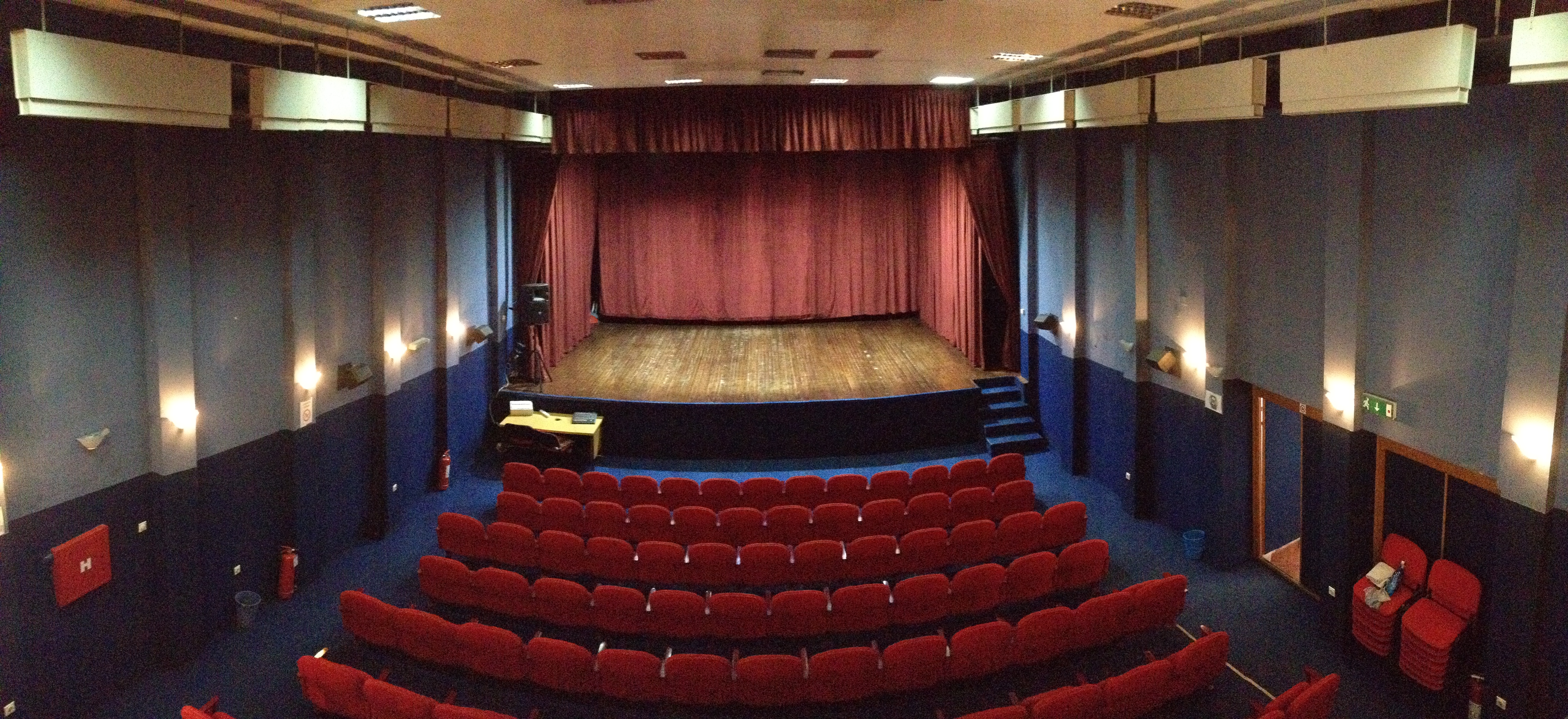 Amatersko Dramsko Pozoriste Teslic